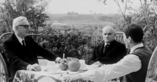 Screenshot del film Comizi d'amore di Pier Paolo Pasolini, 1965